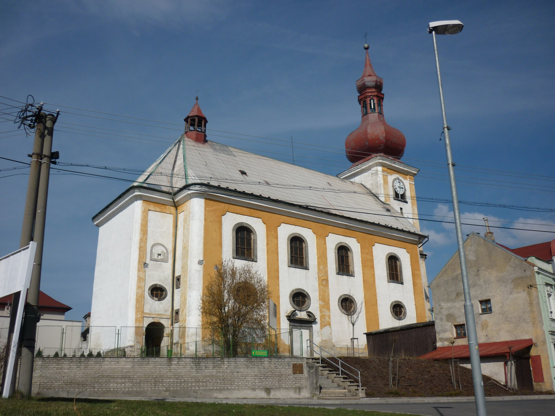 Skalná